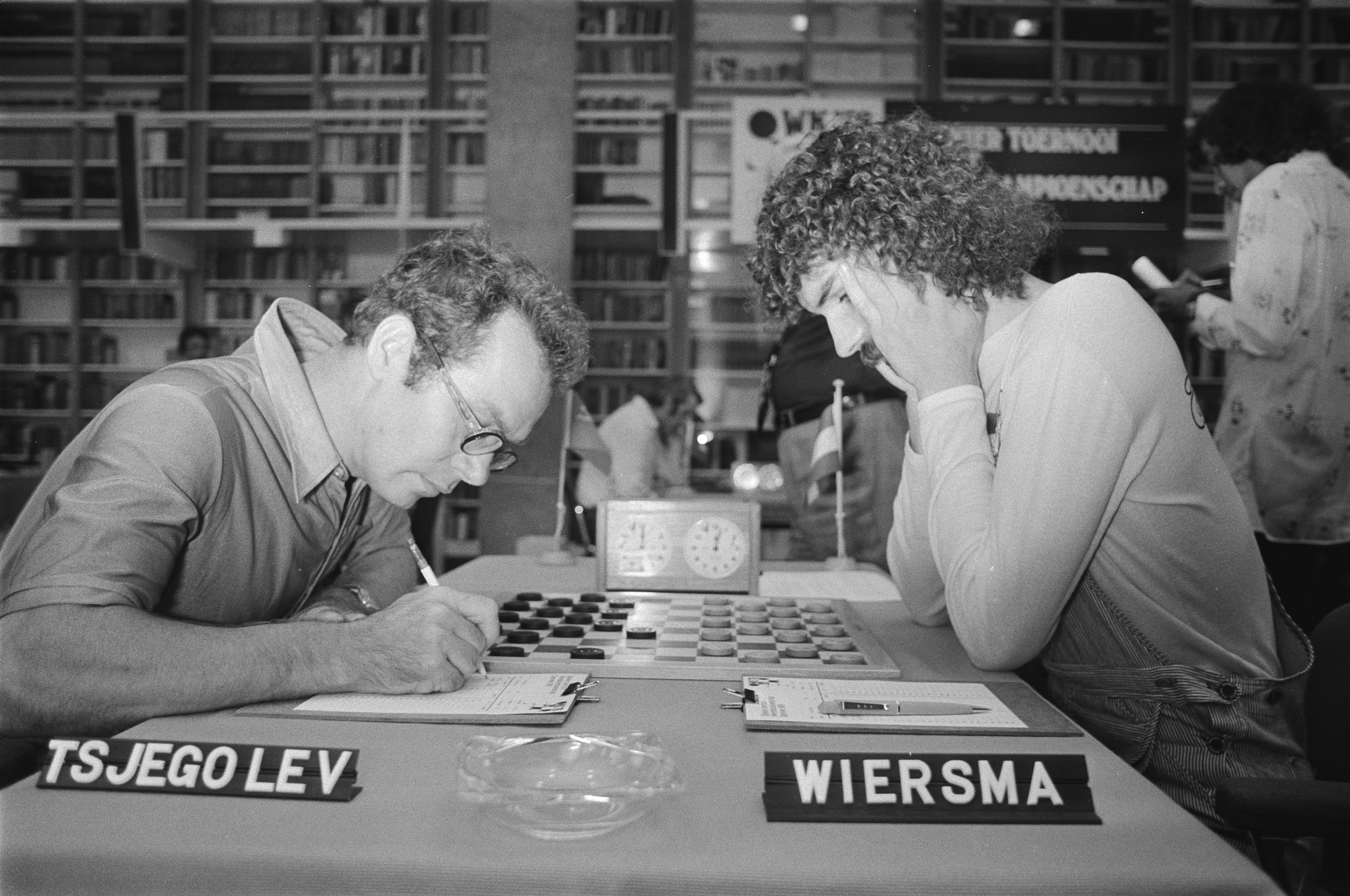 Wereldkampioenschappen Dammen in Amsterdam, Wiersma (rechts) tegen Sjtsjogoljev